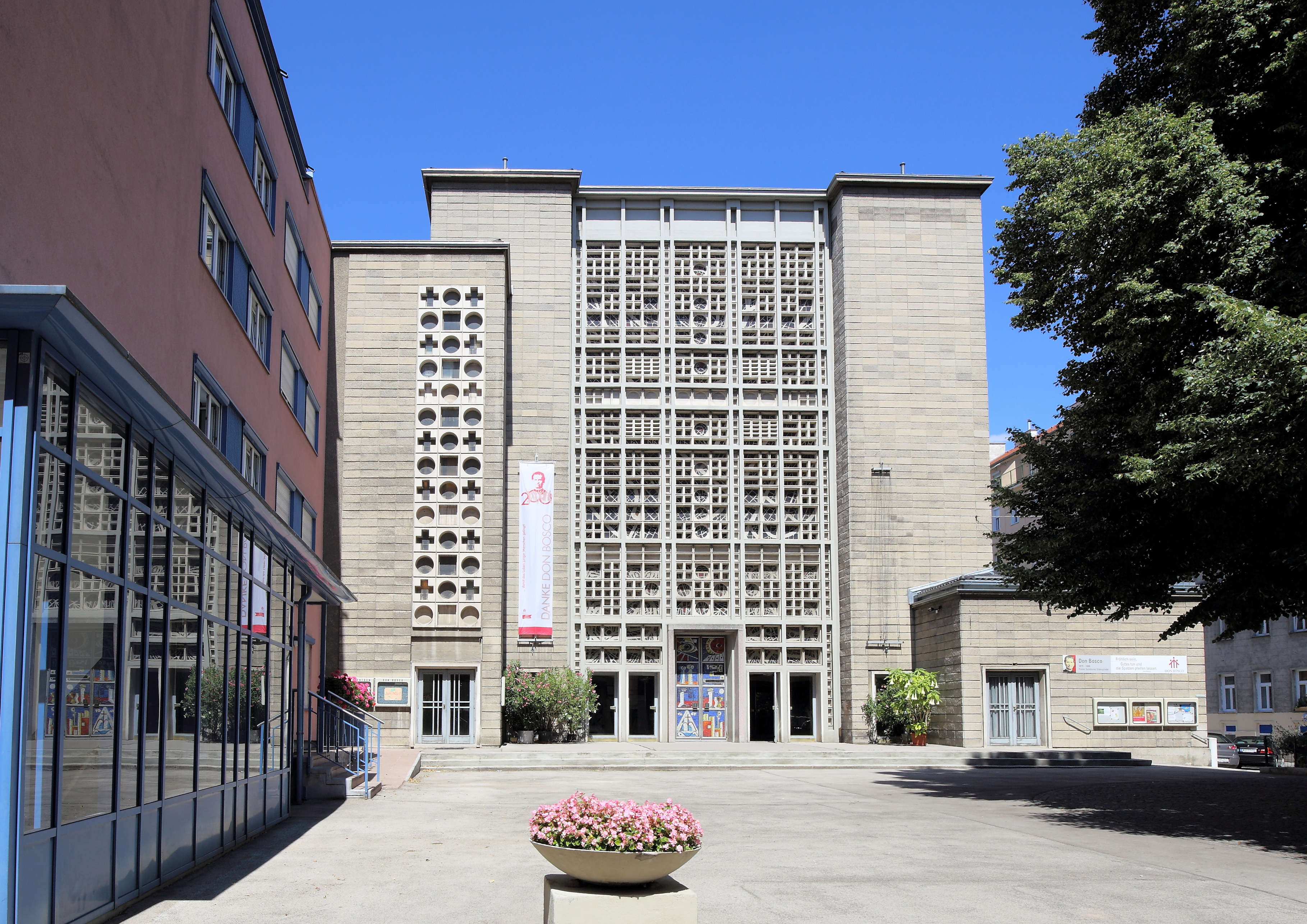 Südwestansicht der röm.-kath. Pfarrkirche hl. Johannes Don Bosco in Neuerdberg, ein Ortsteil des 3. Wiener Gemeindebezirkes Landstraße..Die Kirche wurde nach Plänen des Architekten Robert Kramreiter von 1954 bis 1958 errichtet.